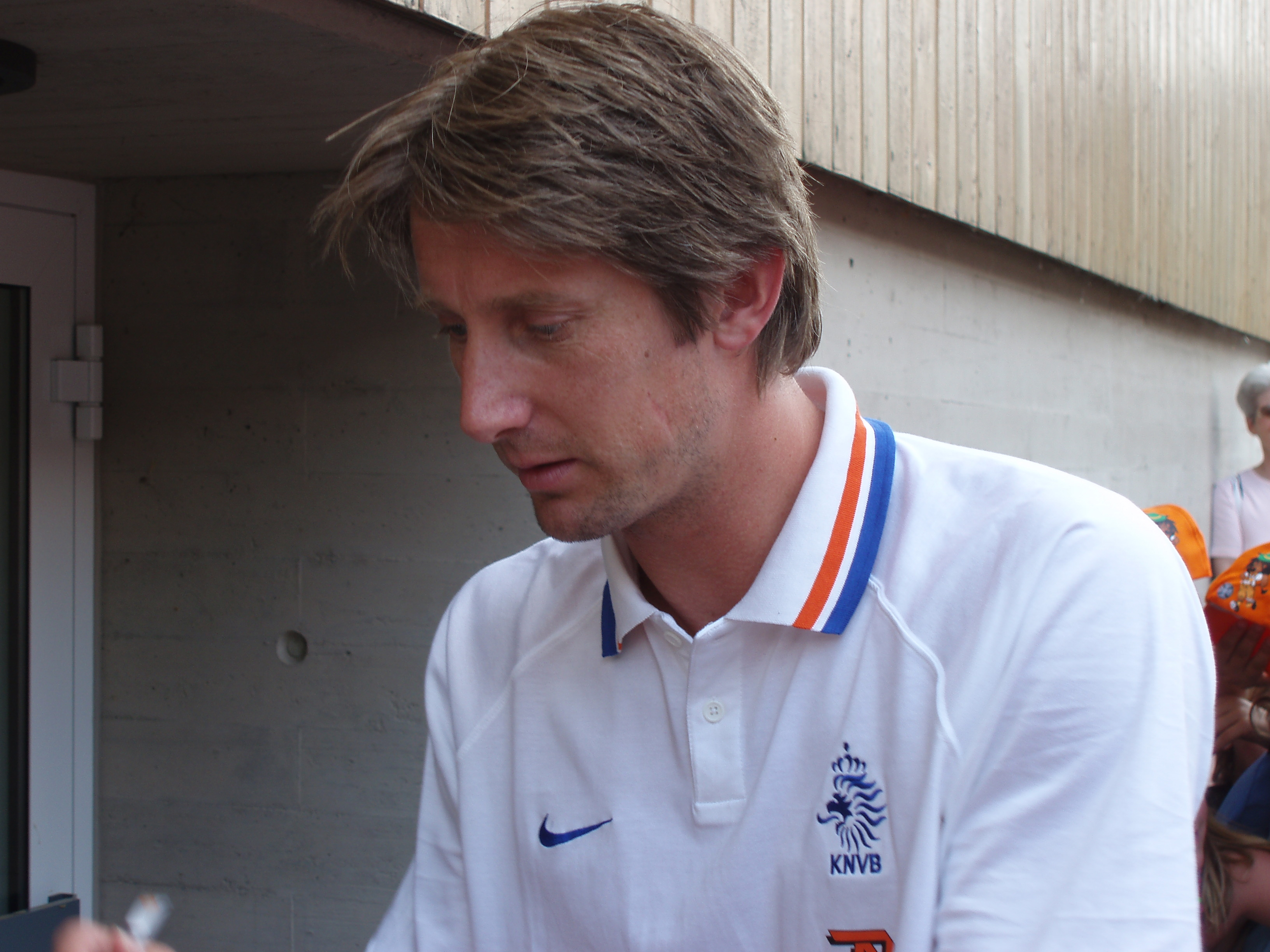 Edwin van der Sar, Spieler der niederländischen Fußballnationalmannschaft